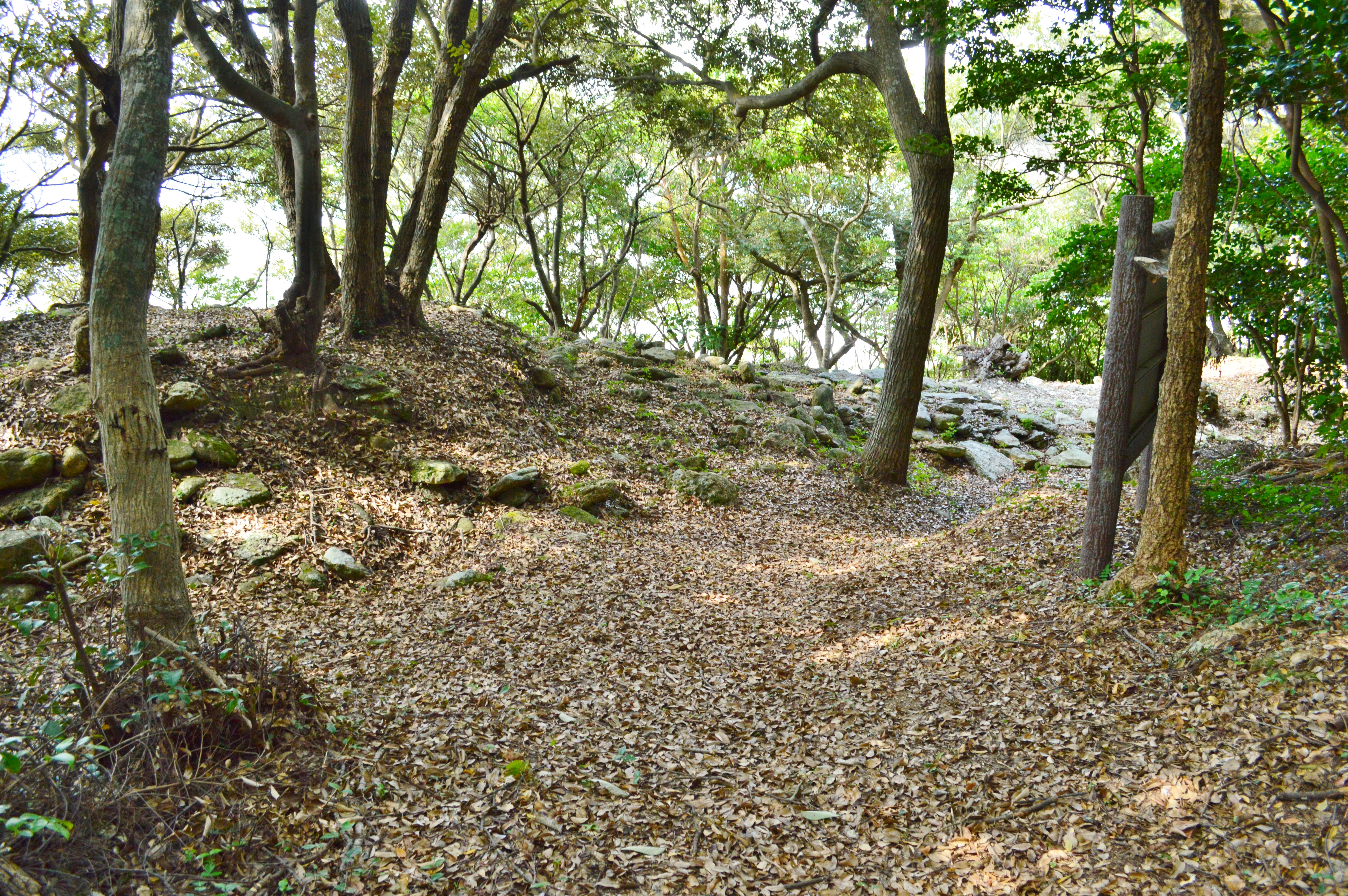 根曽第2号墳 墳丘全景